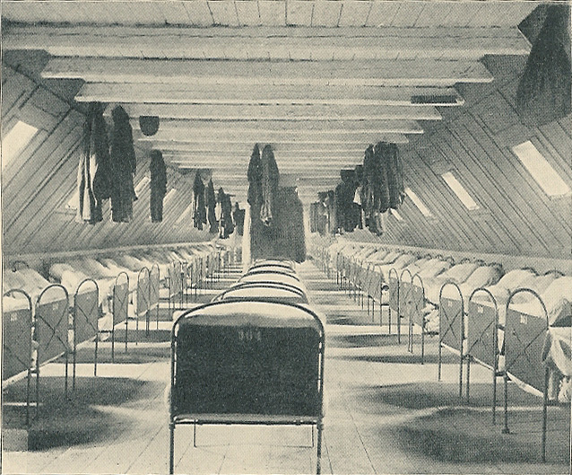 Sovesal på Ladegården i København omkring år 1900